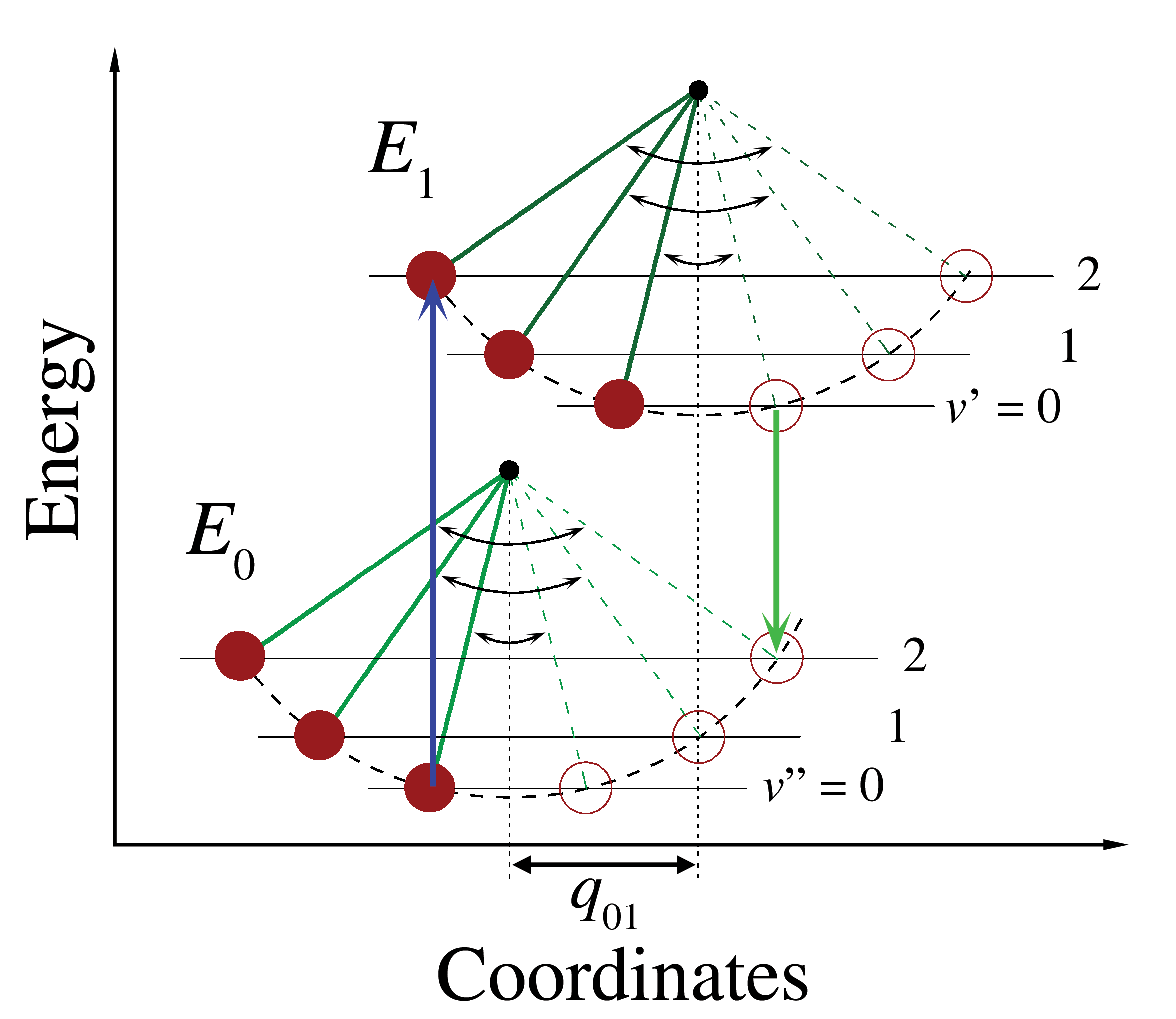 Franck Condon principle in a classical pendulum.